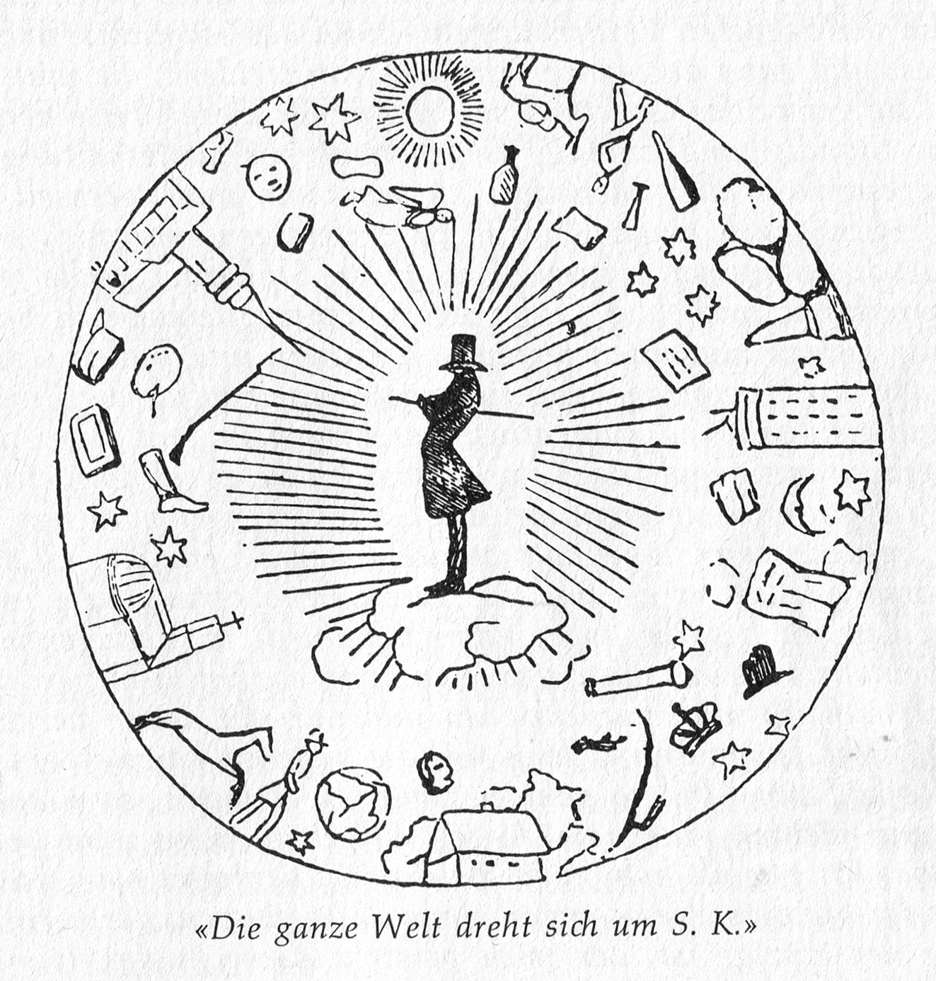 Karikatur: Alles dreht sich um S.K. Aus dem dänischen Satireblatt Corsaren (1847)